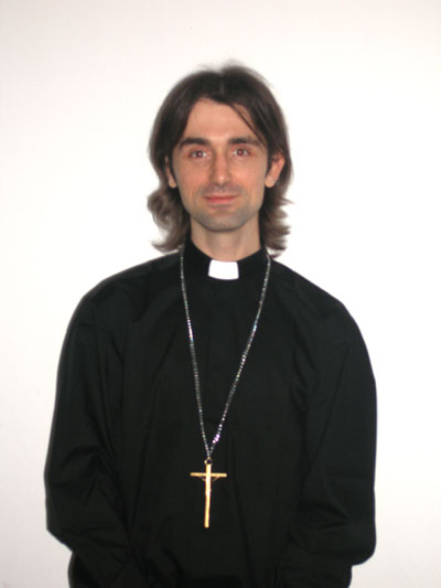 Szymon Niemiec - polski działacz organizacji LGBT, duchowny protestancki.